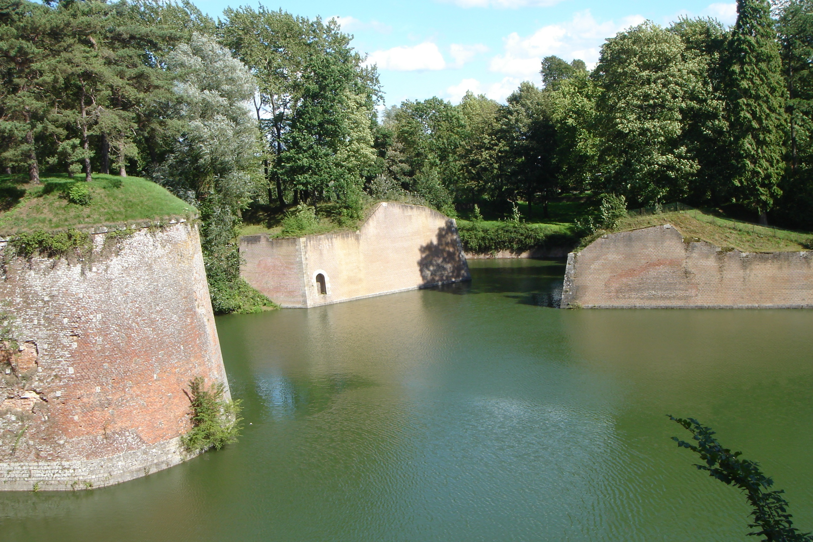 Le Quesnoy - les remparts